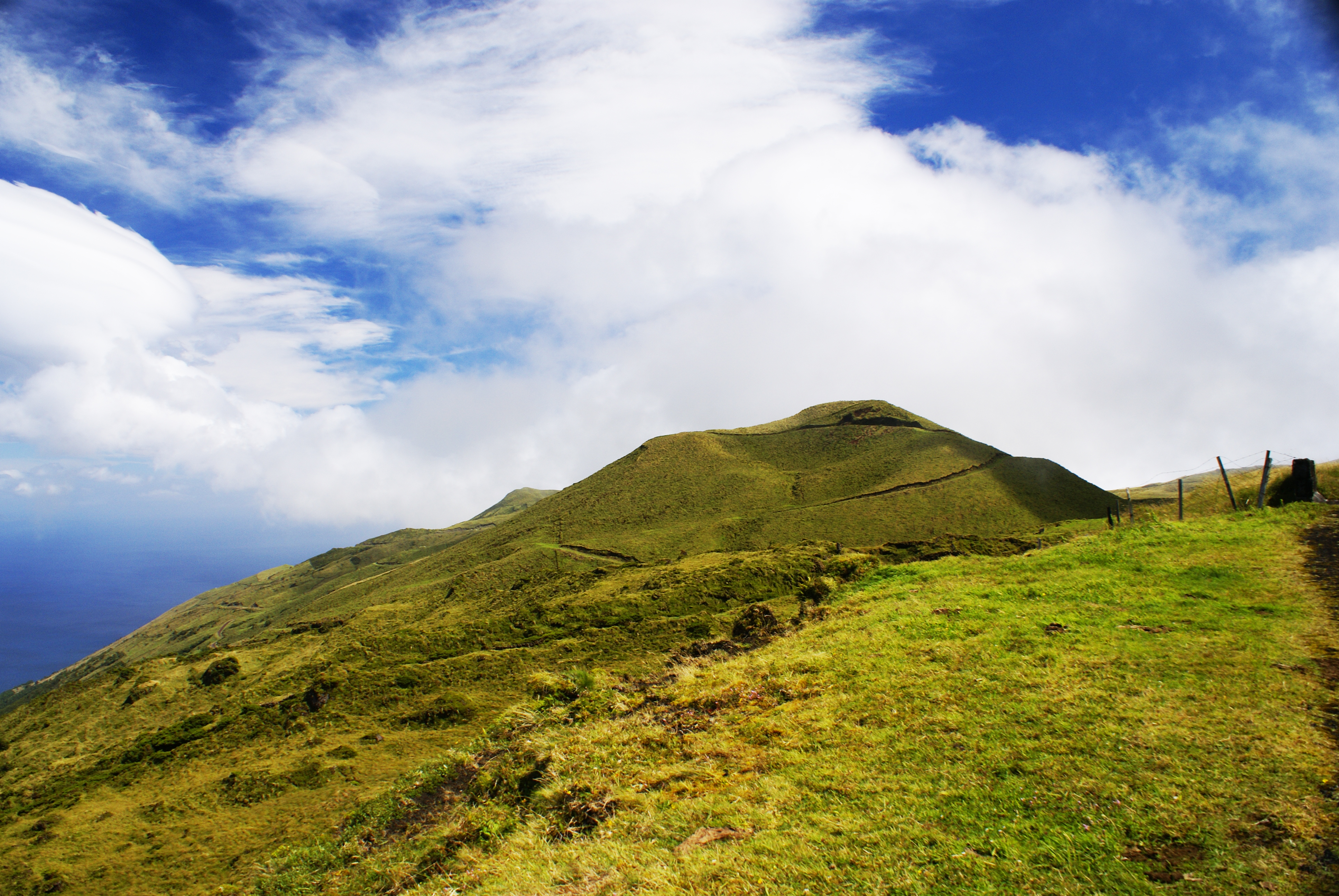 Interior montanhoso da ilha do Pico, terra verde, Açores, Portugal